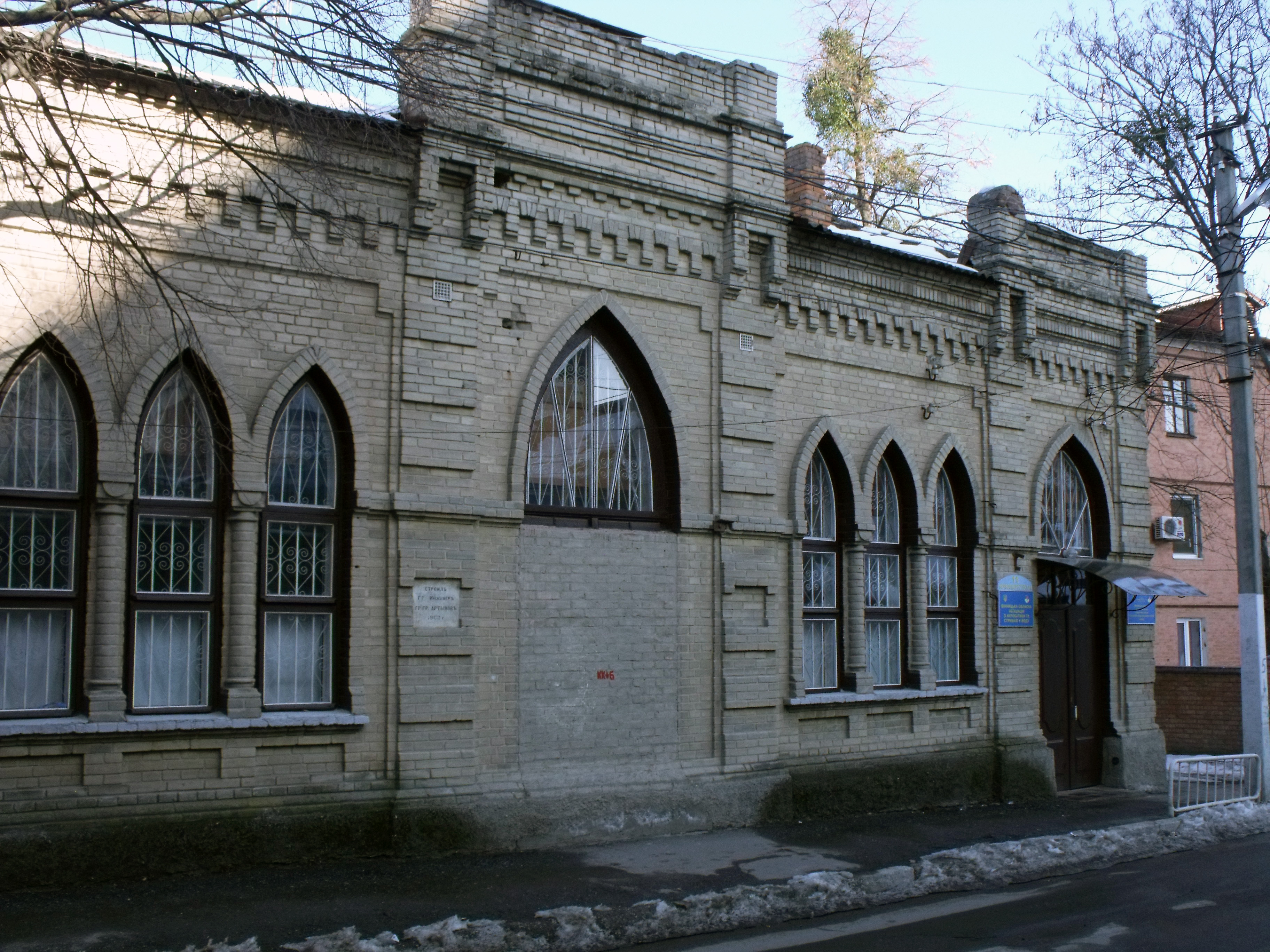 Вінниця, вул. Червонохрестівська, 11